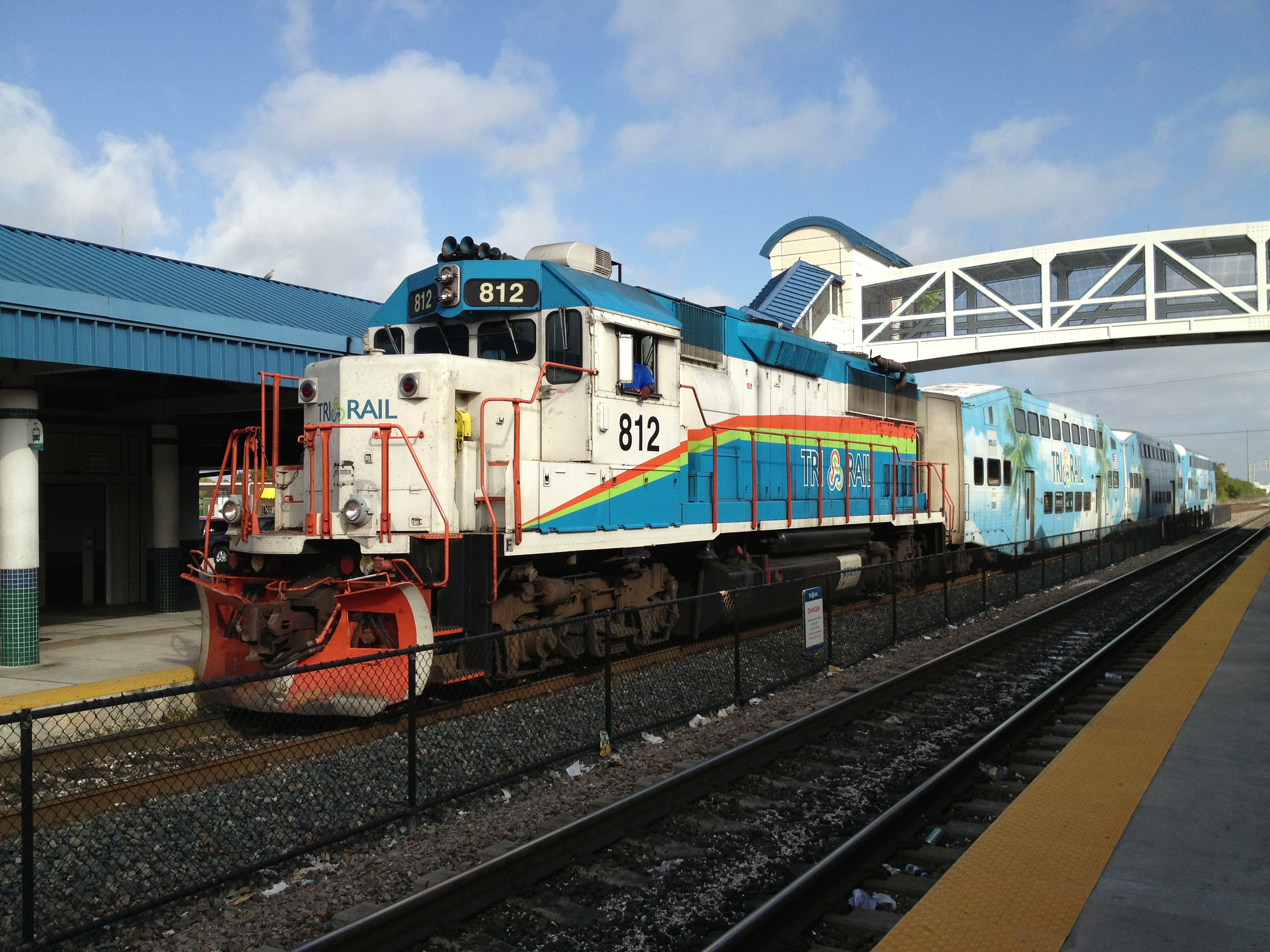 EMD GP49 locomotive.